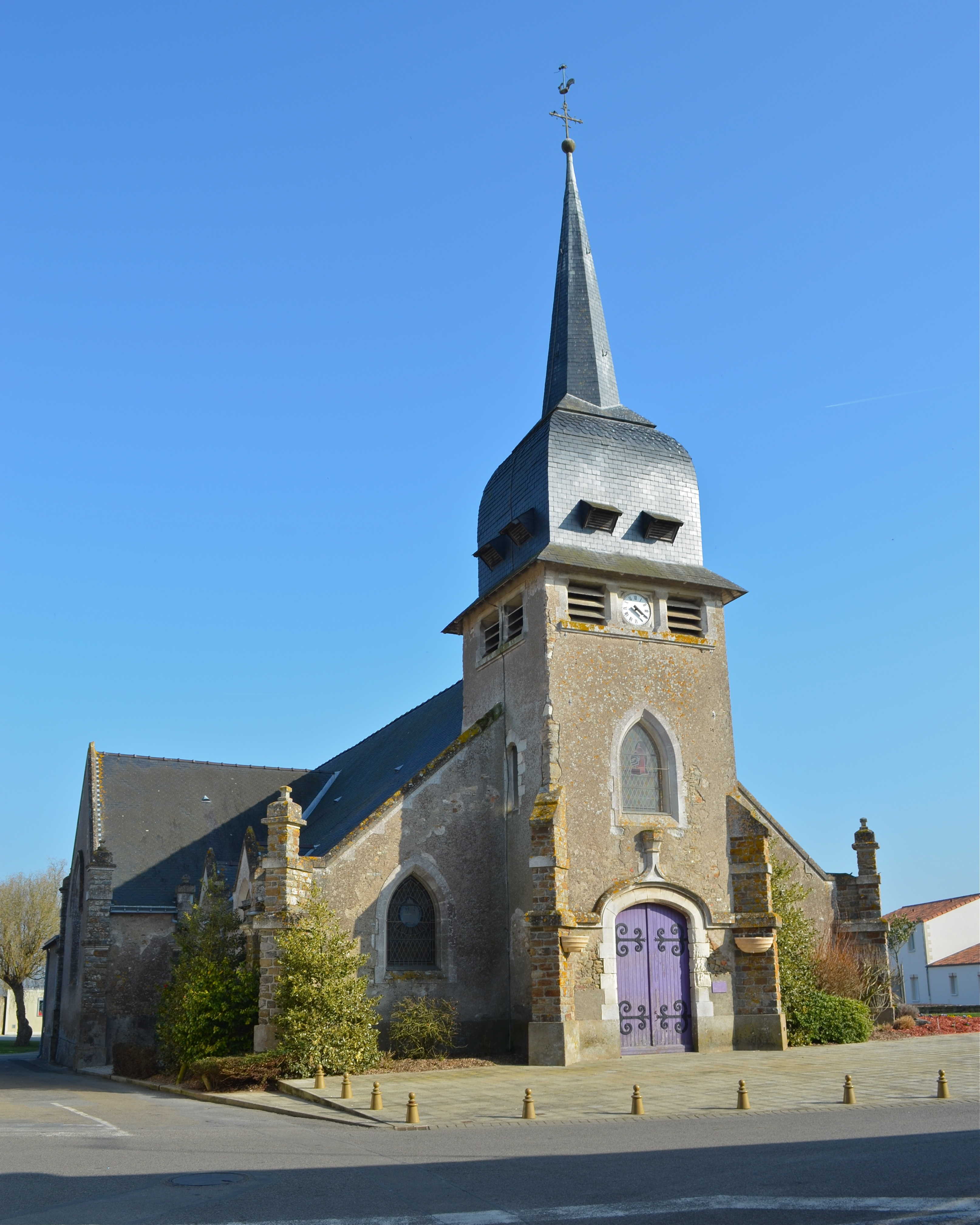 Eglise Saint-Martin - Corsept, Loire-Atlantique